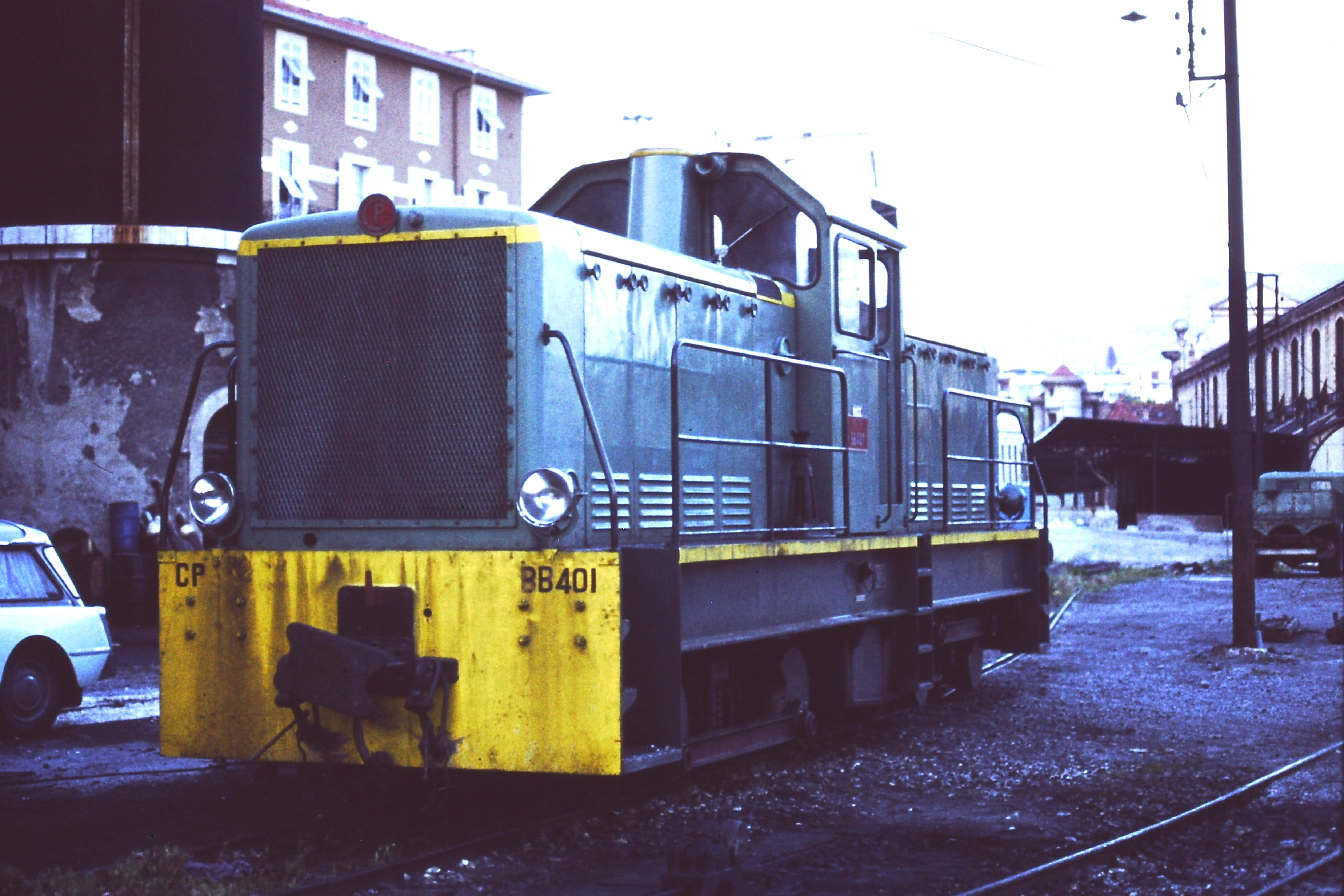 Chemins de fer de Provence (CP) locomotief BB401 van het type Brissonneau et Lotz (BL) te Nice Gare du Sud.